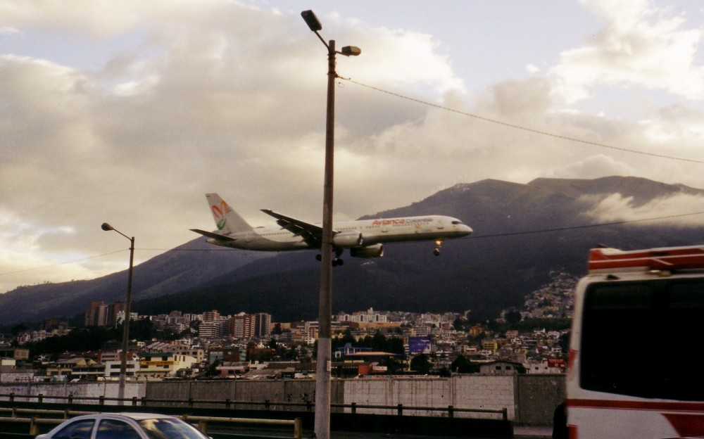 Volcano Pichincha and Quito, Ecuador